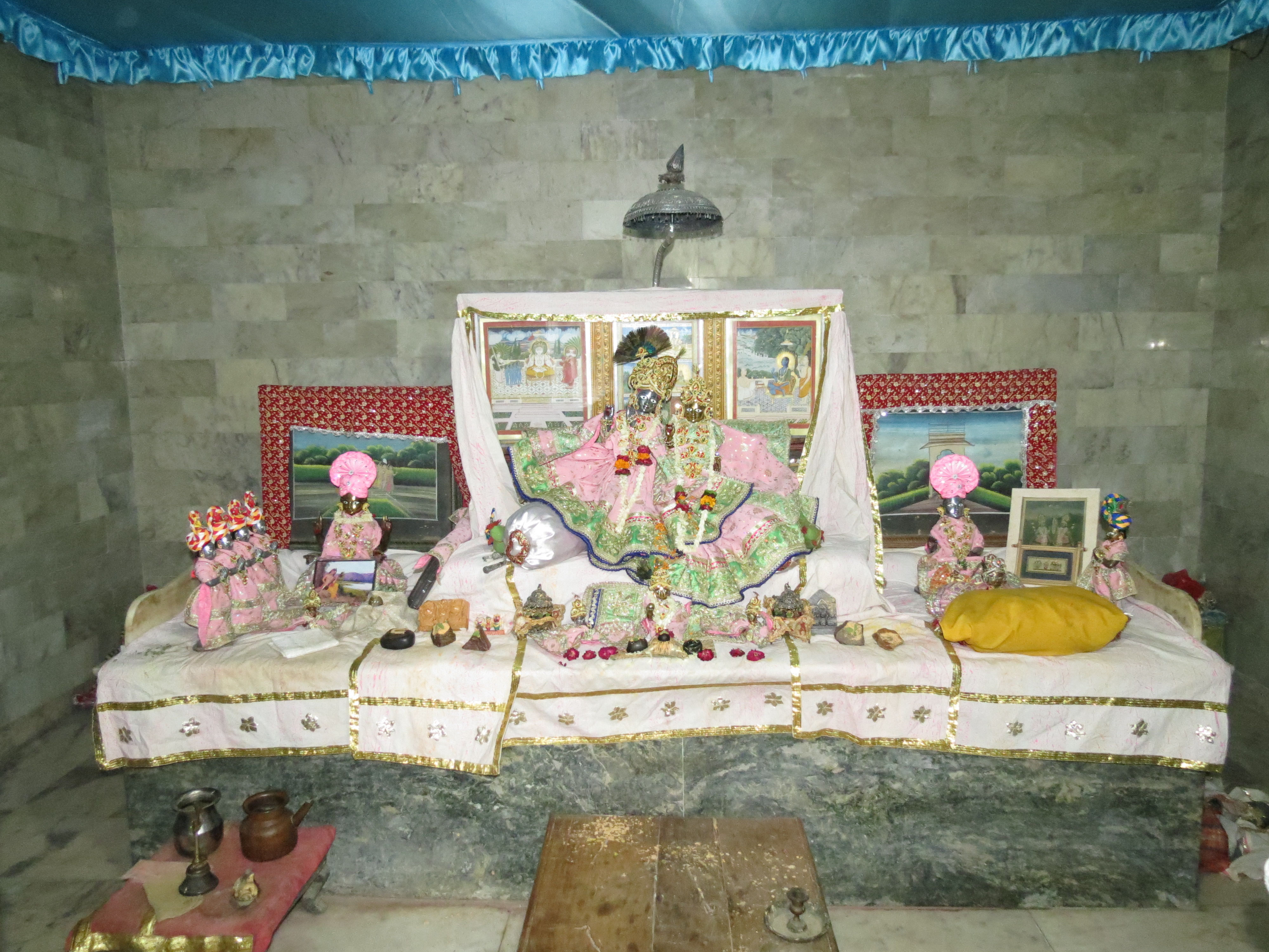 मंदिर में विराजमान ठाकुर श्री राधारमण लालजी